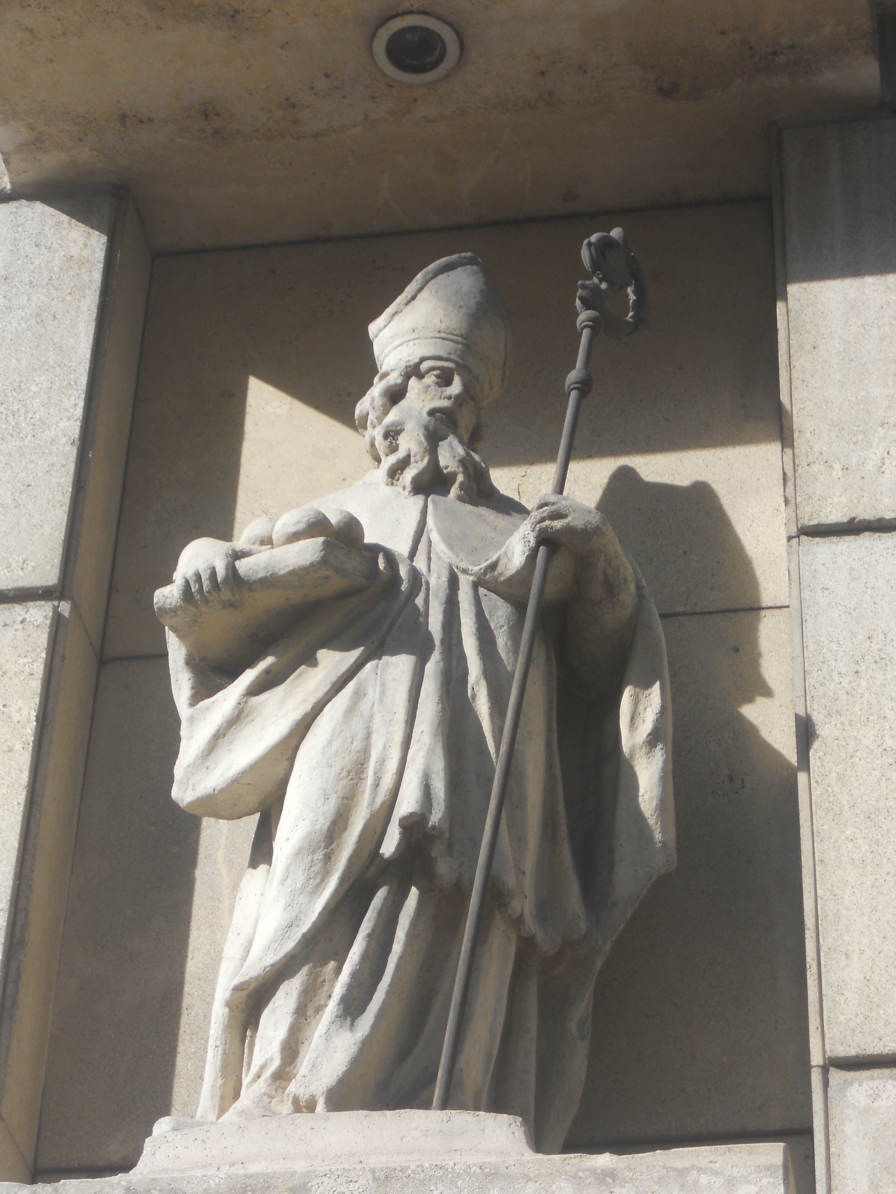 Figur des Heiligen Nikolaus, Landstraßer Hauptstraße 11 in Wien